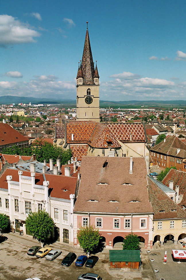 Die Hermannstädter Stadtpfarrkirche vom Ratturm aus gesehen